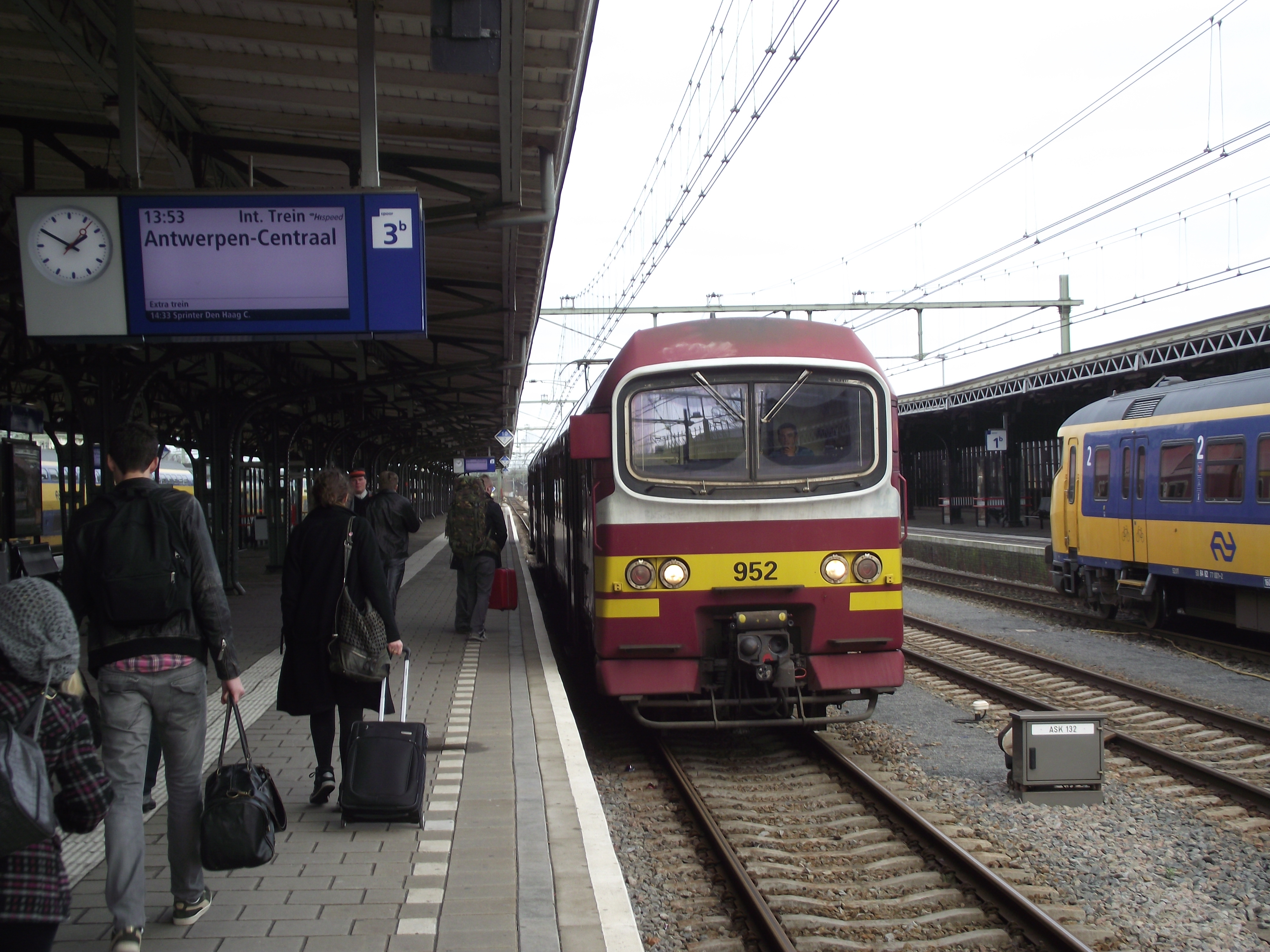 Pas ingelegde extra IC tussen Roosendaal en Antwerpen na het Fyra debacle.